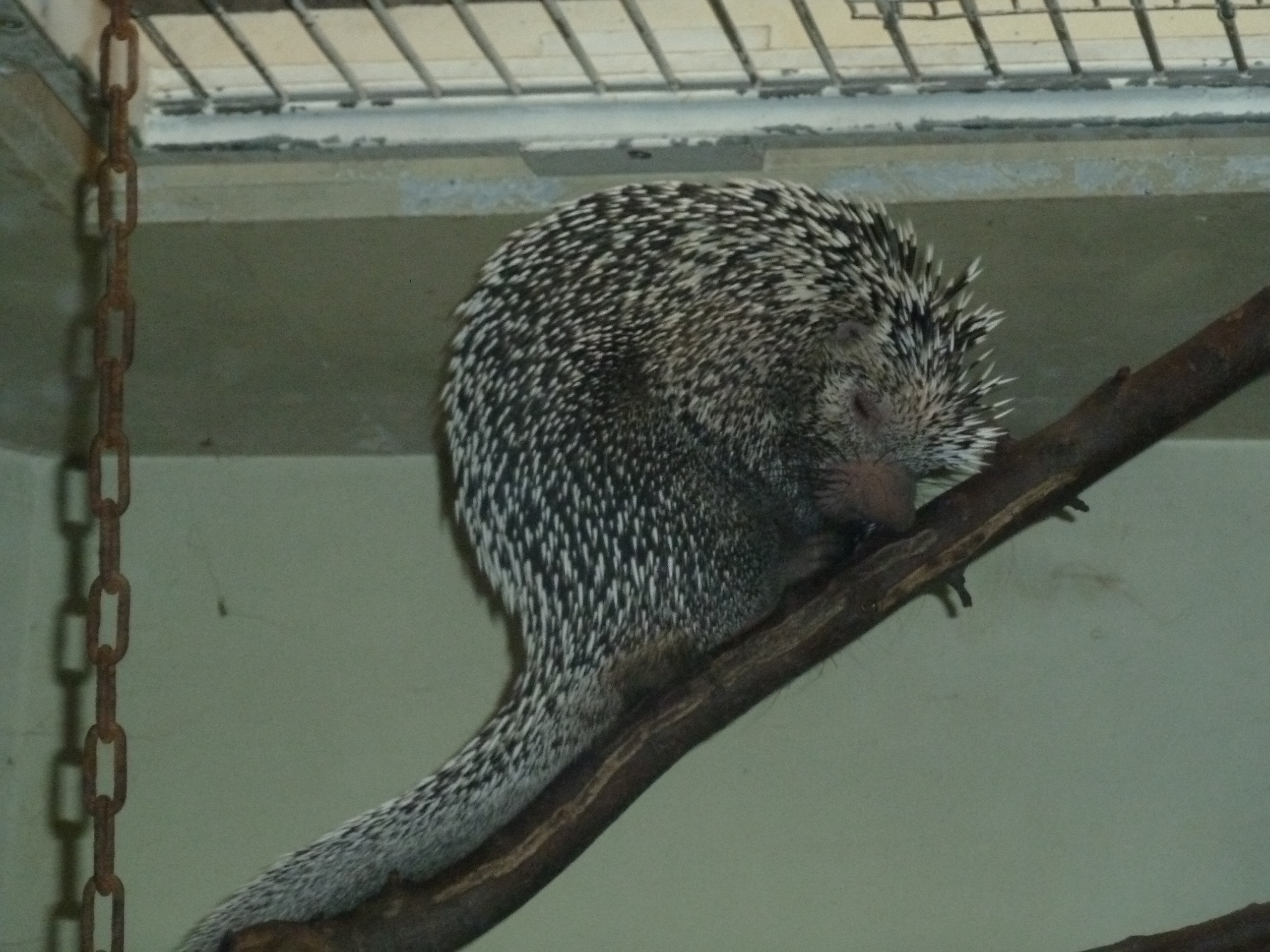 Greifstachler in der Wilhelma Stuttgart